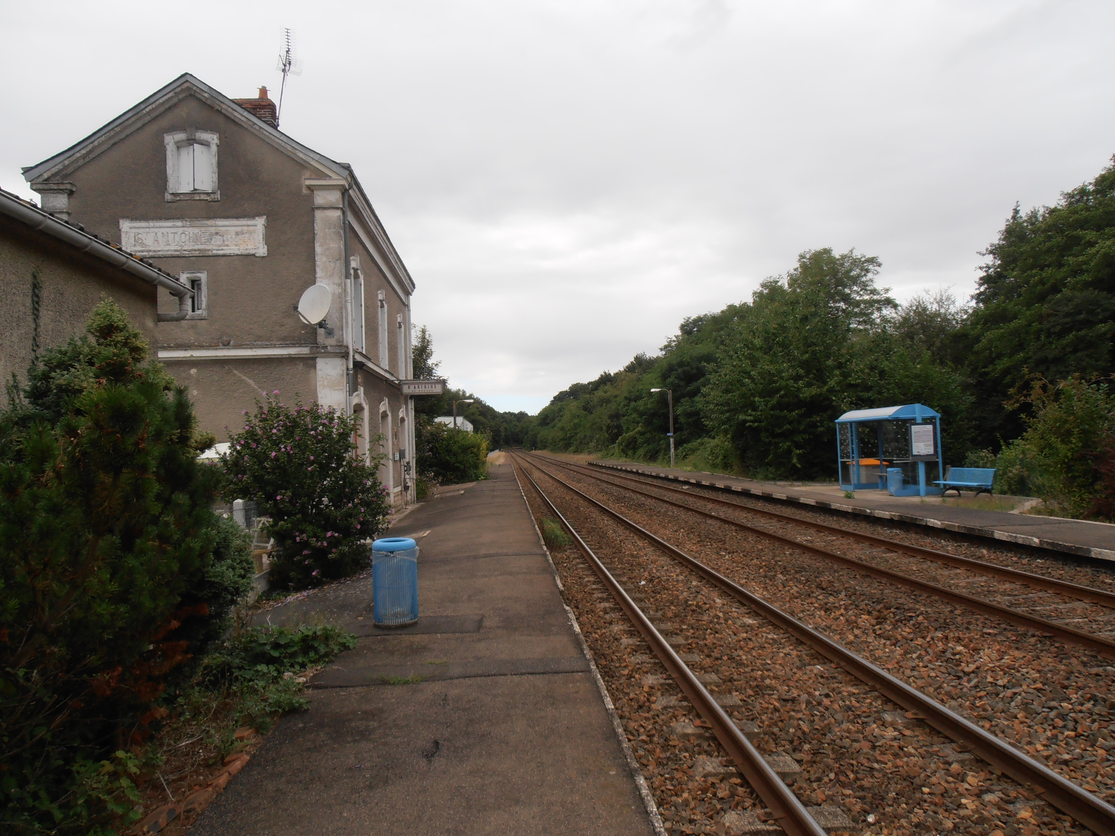 La gare, les quais et les voies